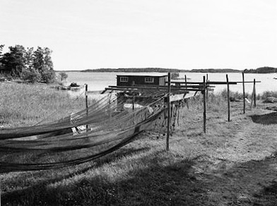 Gistvall, en öppen gräsbevuxen plats med en ställning för upphängning av fiskenät, för torkning, rensning av sjöväxter, och för kontroll av skador som kan behöva repareras.